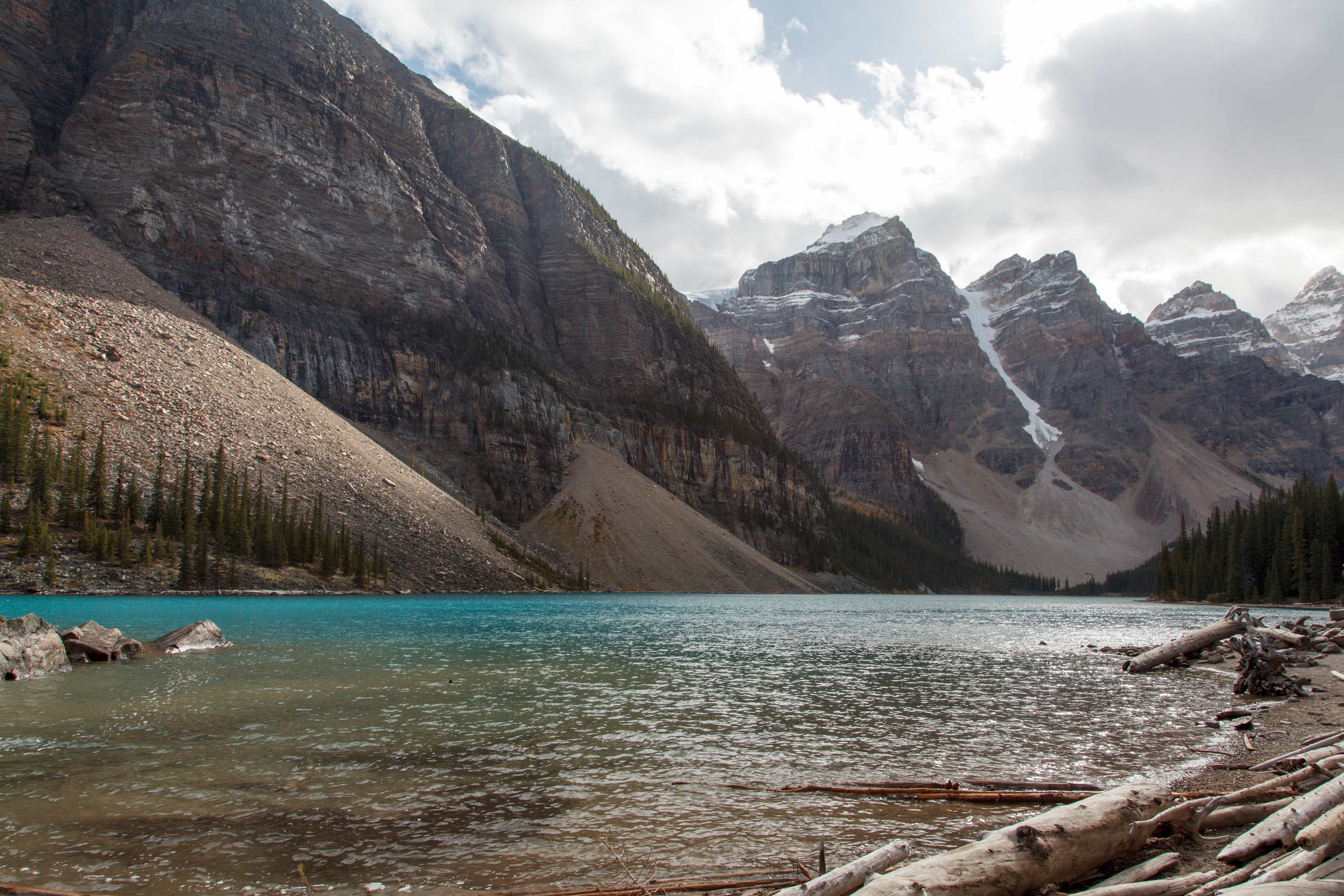 Moraine Lake